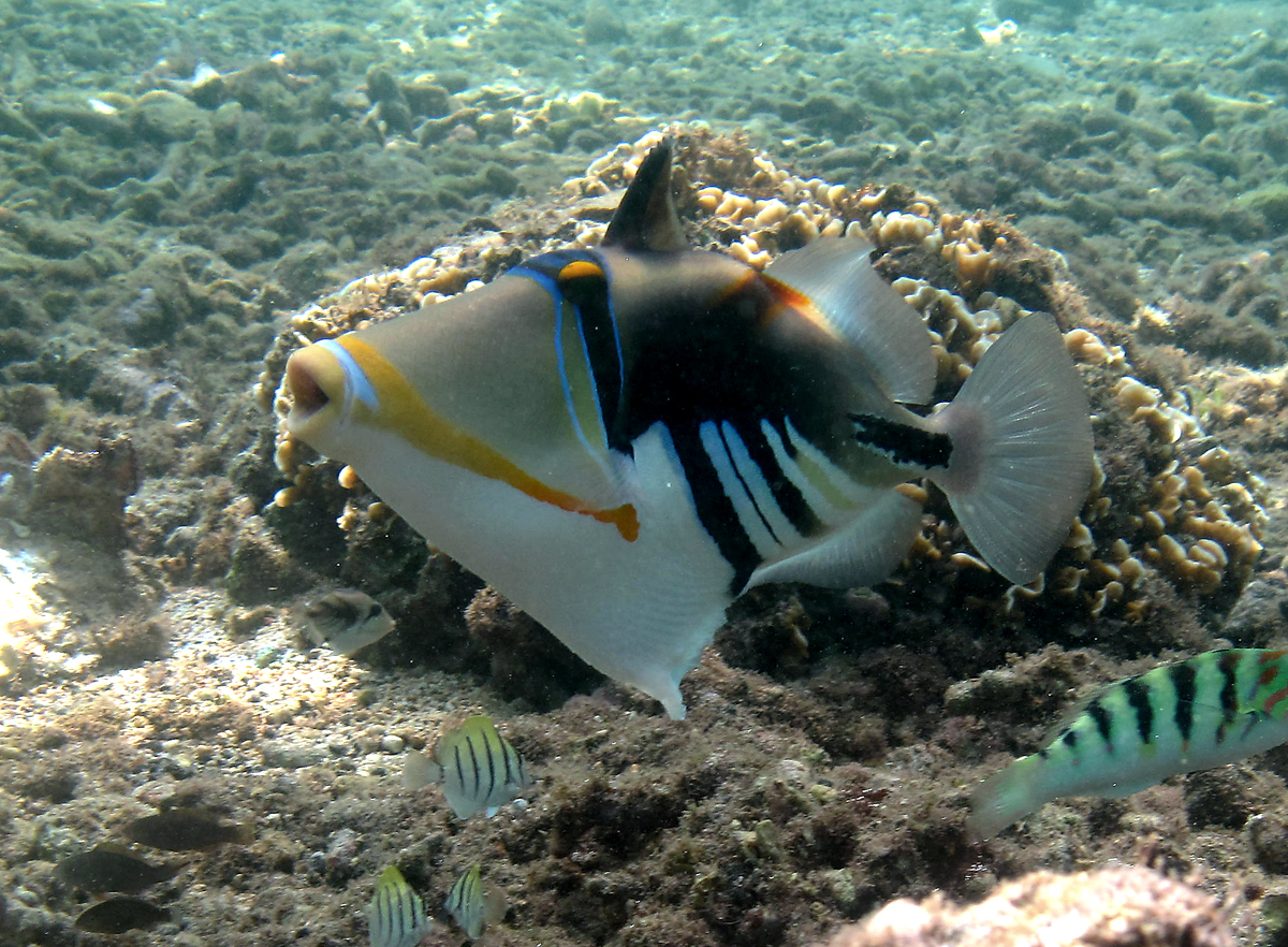 Un baliste Picasso (Rhinecanthus aculeatus) en attitude d'intimidation à la Réunion.